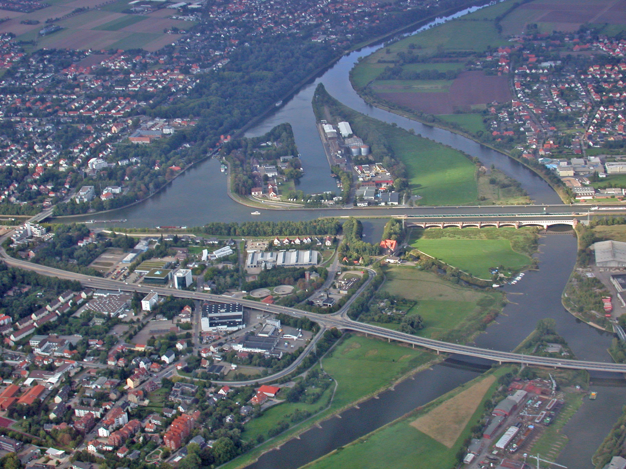 Luftaufnahme vom Wasserstraßenkreuz Minden